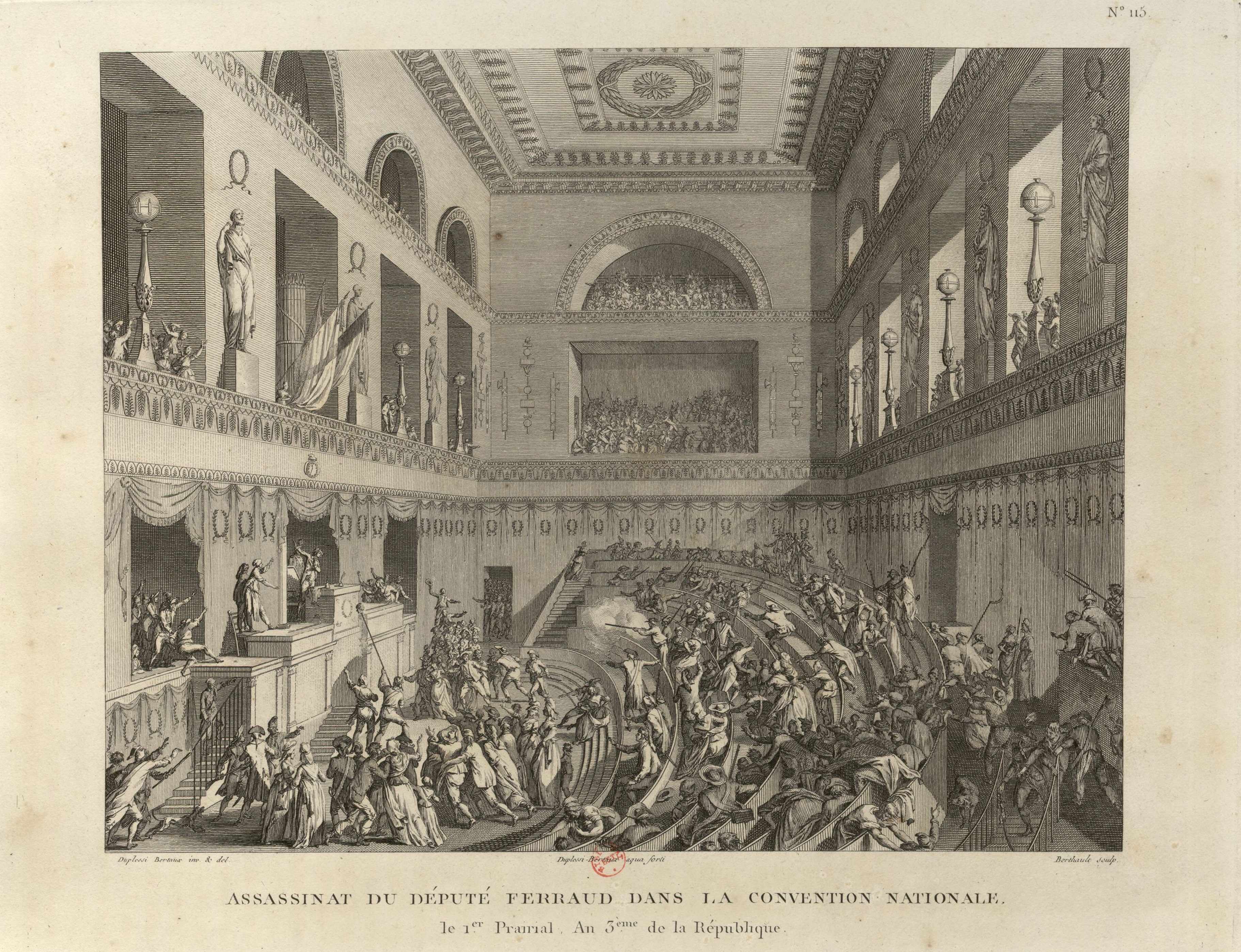 Assassinat du député Jean Bertrand Féraud (1764-1795) à la Convention, le Ier Prairial an III (20 mai 1795). Tableau nº 115, extrait de la Collection complète des tableaux historiques de la Révolution française.